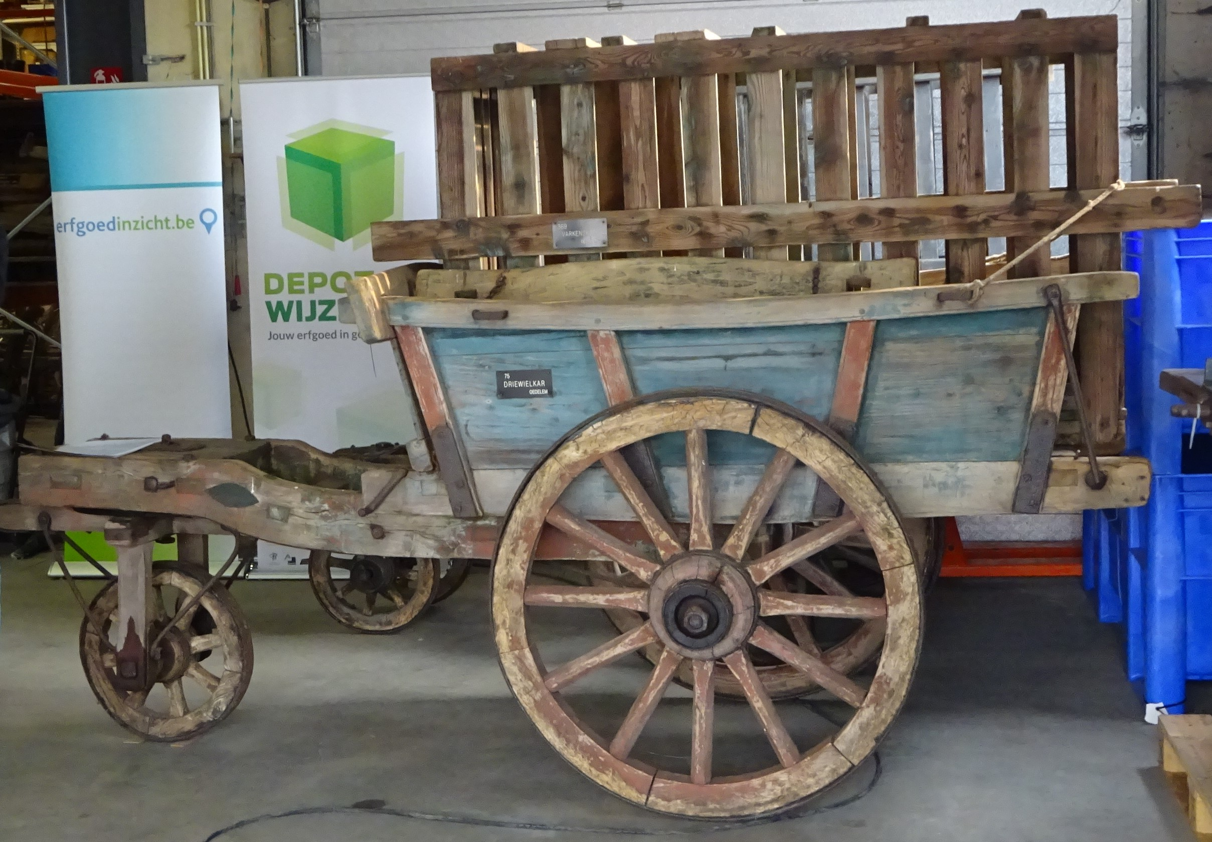 Een driewielkar uit de Collectie Bulskampveld, voorzien van een varkensren.